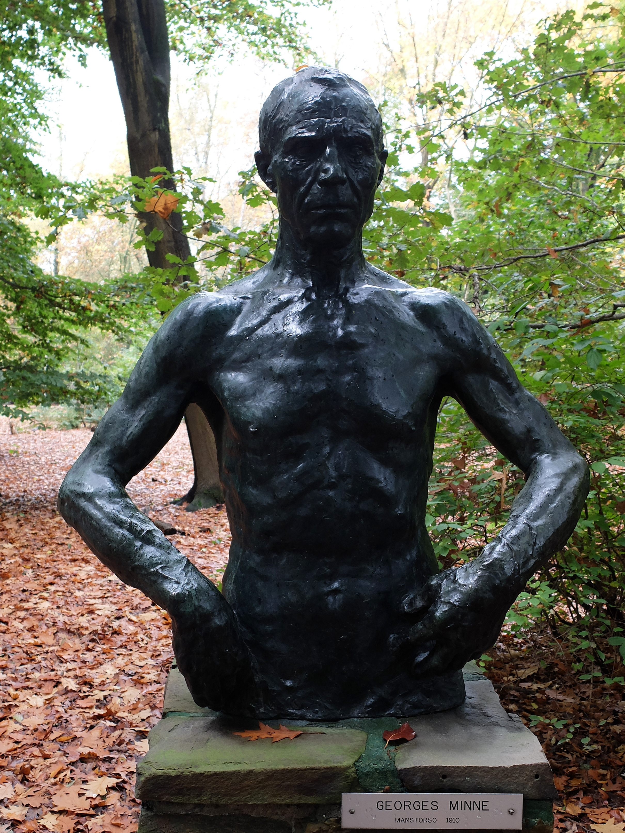 Georges Minne: Manstorso, 1910